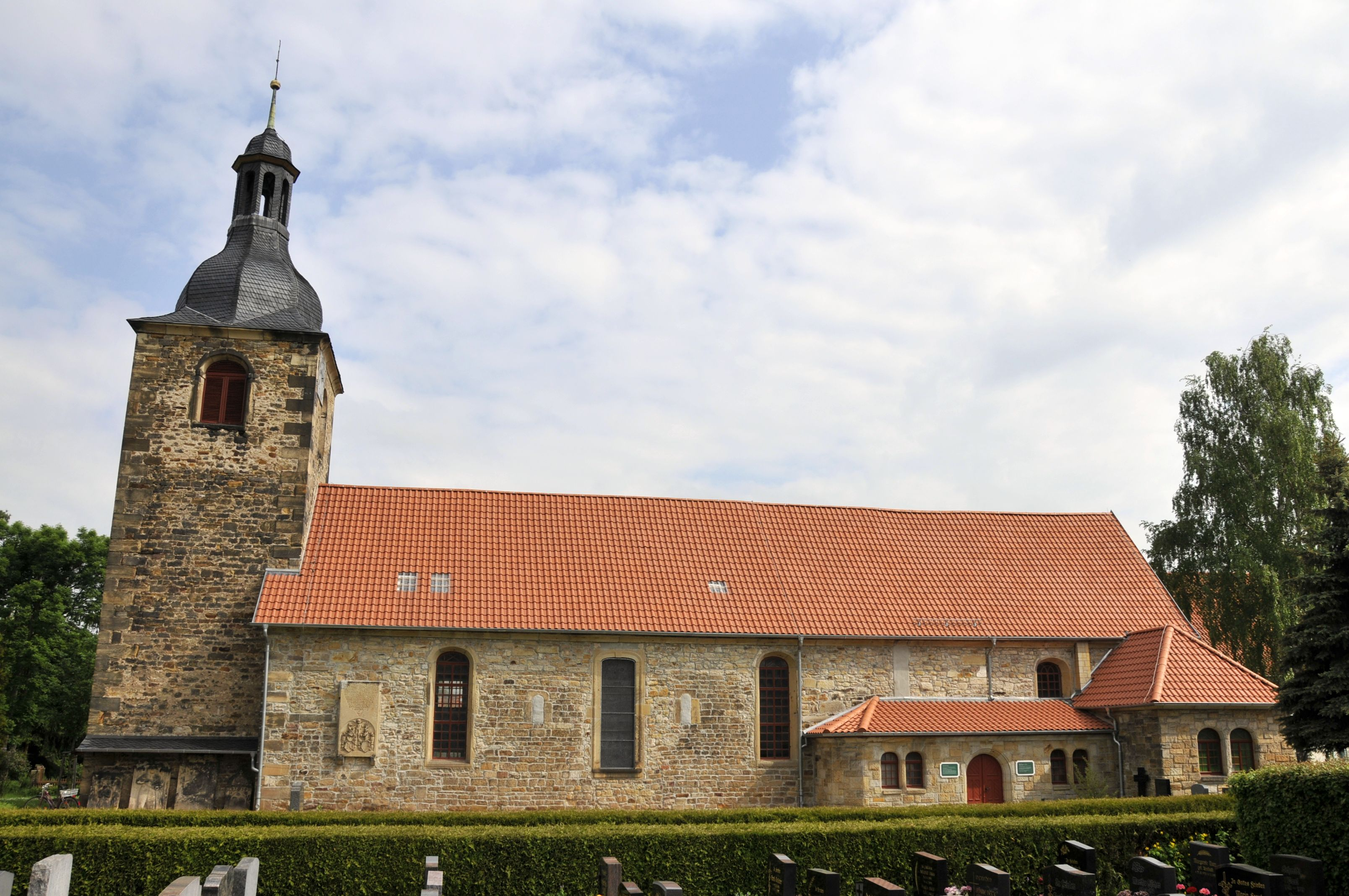 Außden-(Süd)Ansicht der Kirche von Günthersleben